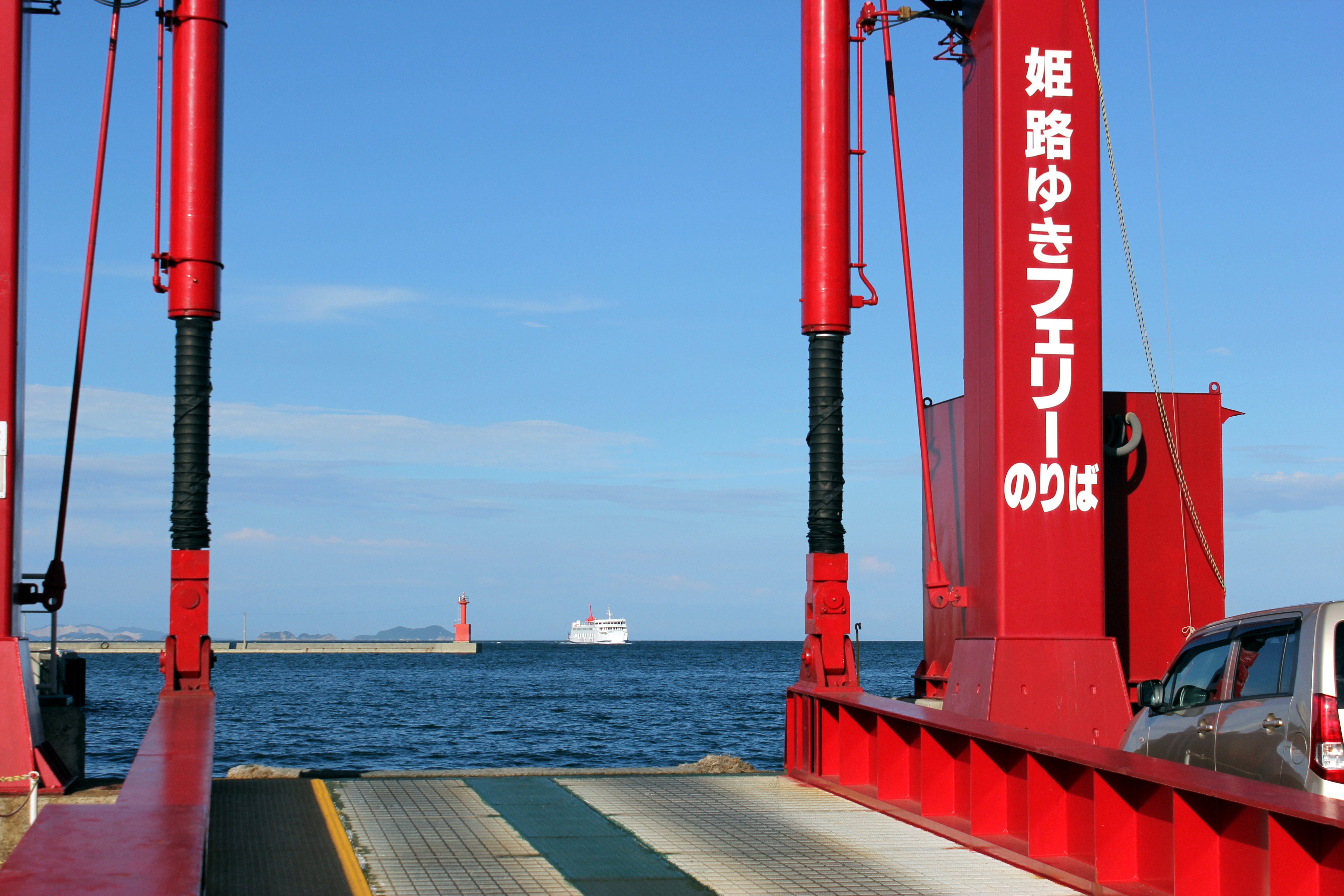 福田港フェリー乗り場より